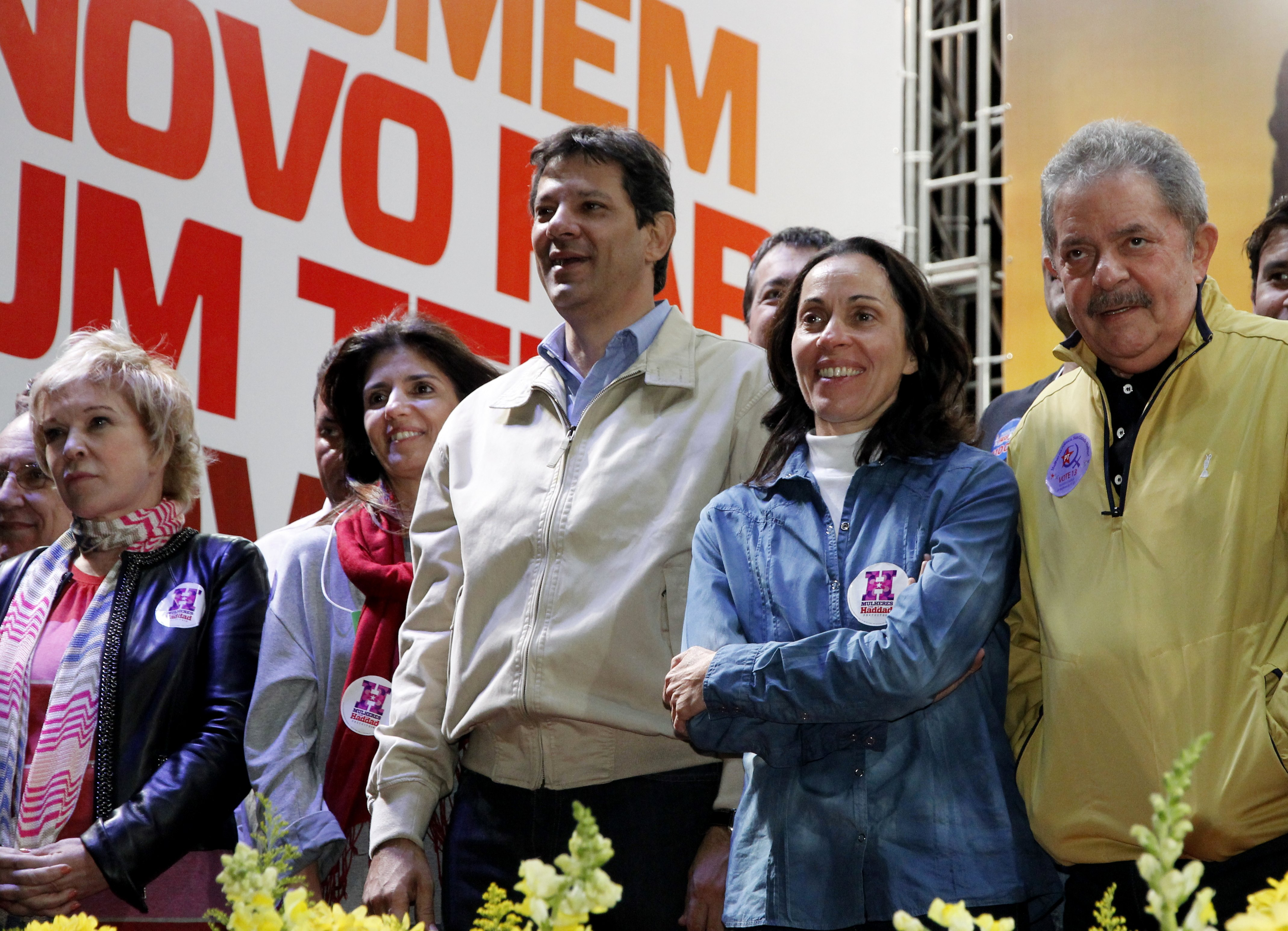 Fernando Haddad com ex presidente Lula, Marta, Ana Estela e Nádia Campeão